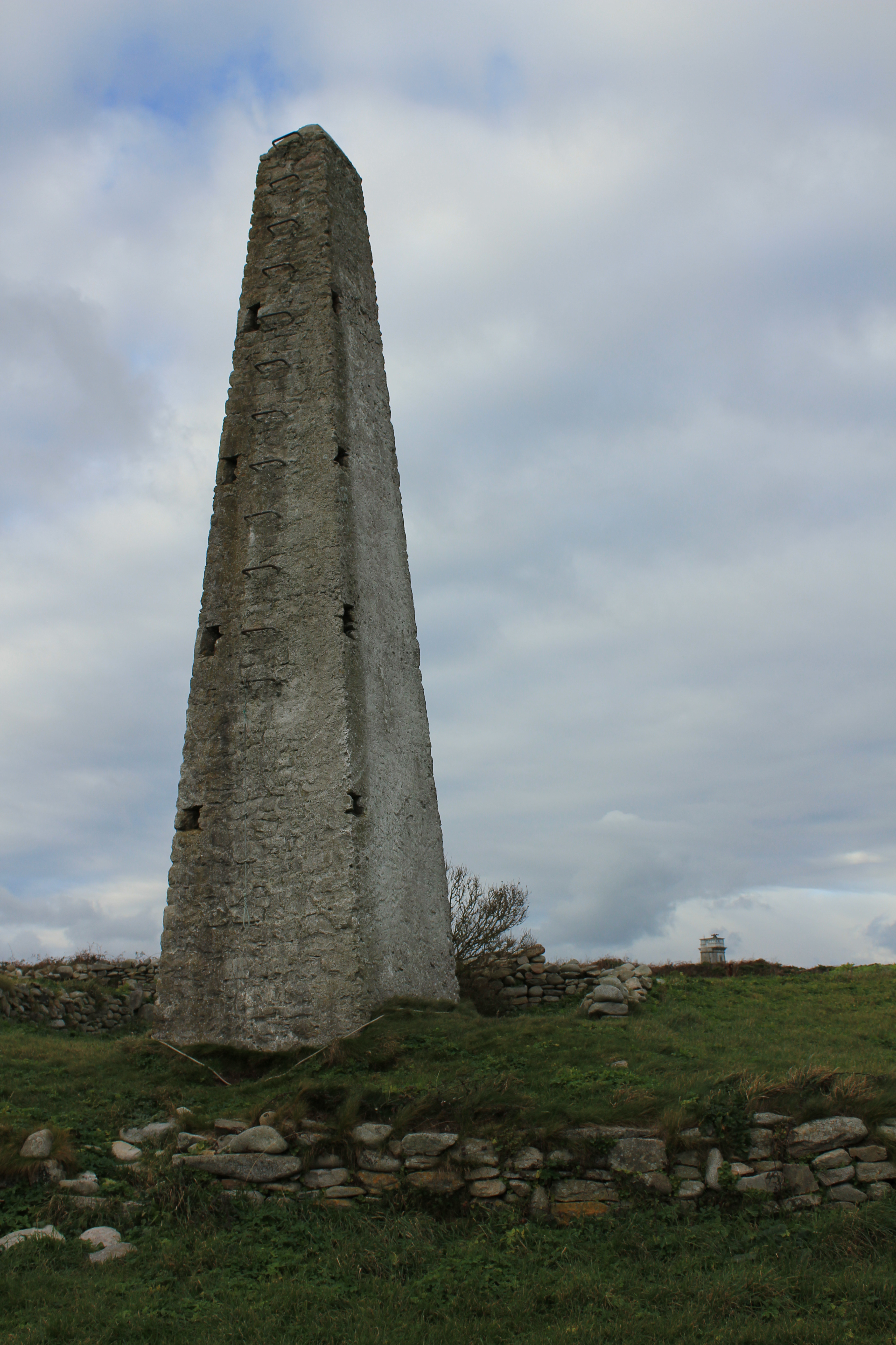 Amer situé au sud-ouest de Molène, avec le sémaphore à l'arrière plan